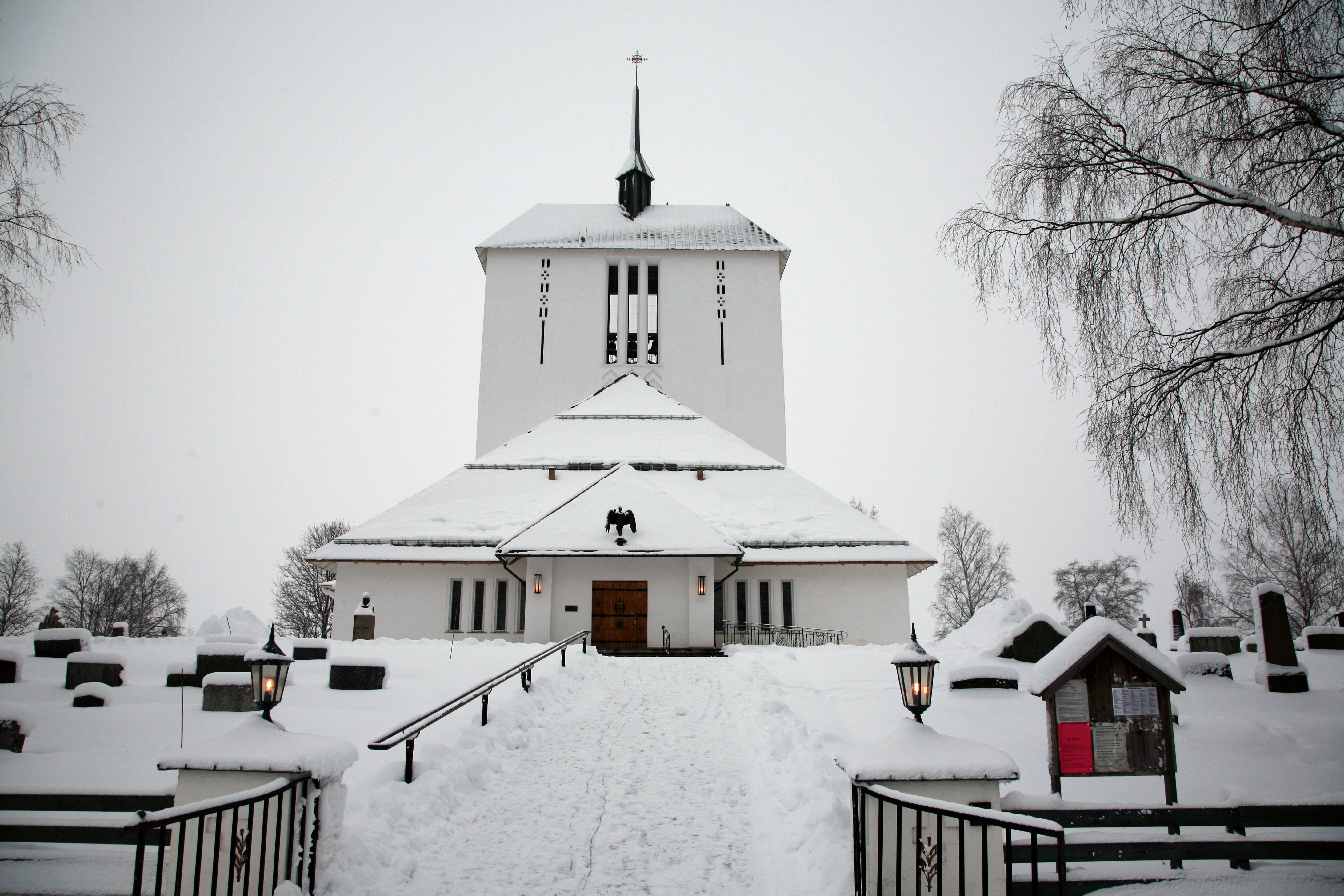 Ullensaker church in Akershus, Norway. Built in 1958. Architect was Arnstein Arneberg.